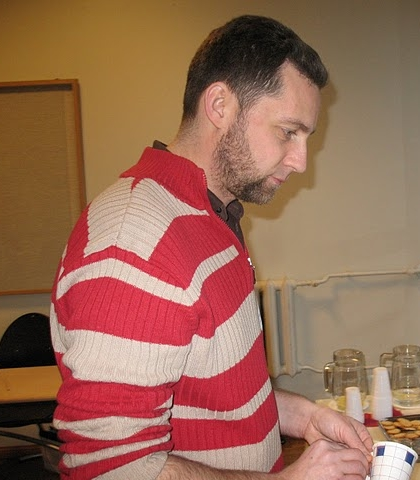 Aleksander Laane Erakonna Eestimaa Rohelised Tallinna piirkonna asutamiskoosolekul Tallinna Ülikooli peahoones